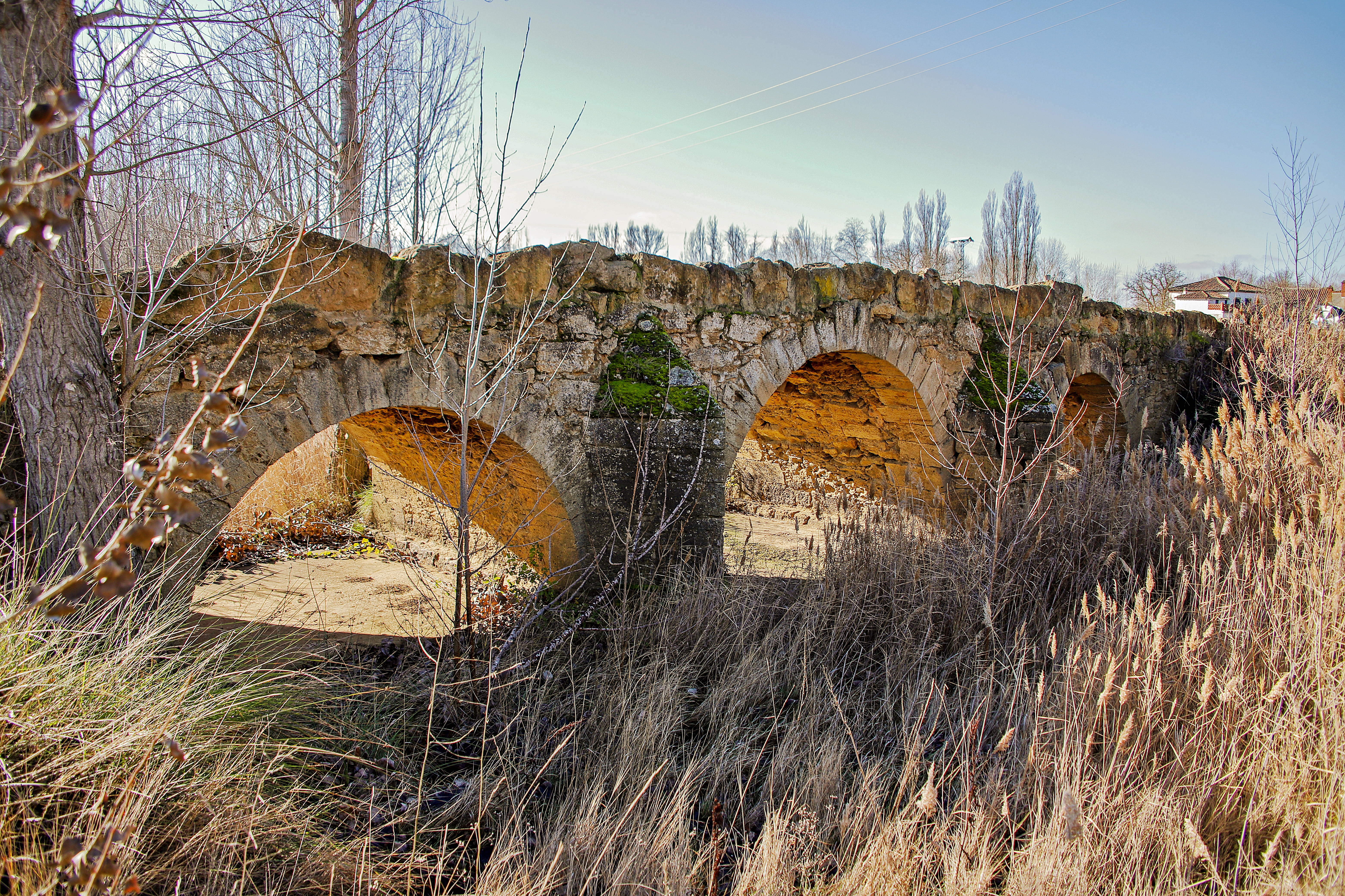 Molino de Alaiz es un despoblado del municipio de Fuentes de Ropel, comarca de Benavente y Los Vales, provincia de Zamora